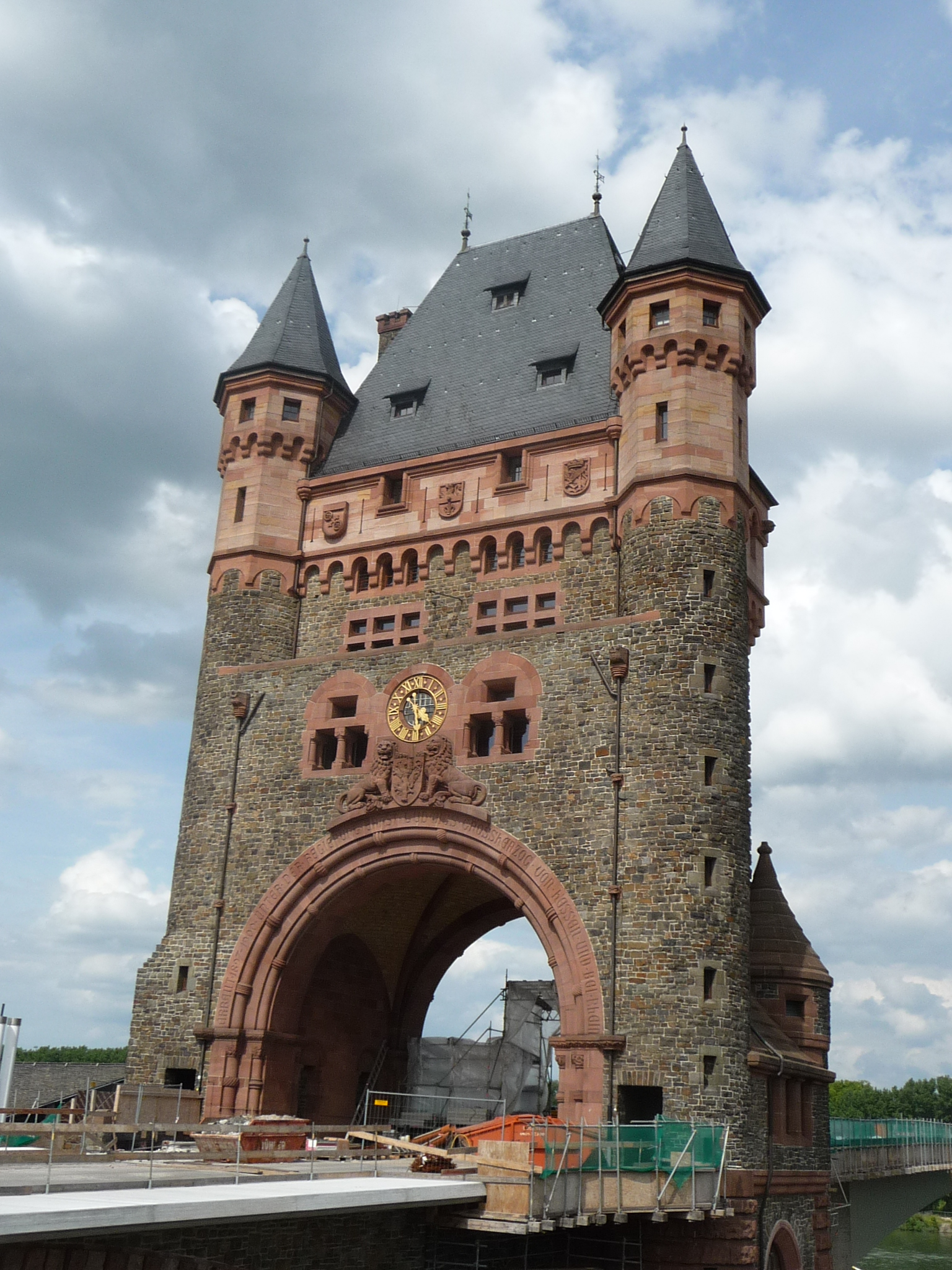 Nibelungenbrücke Worms